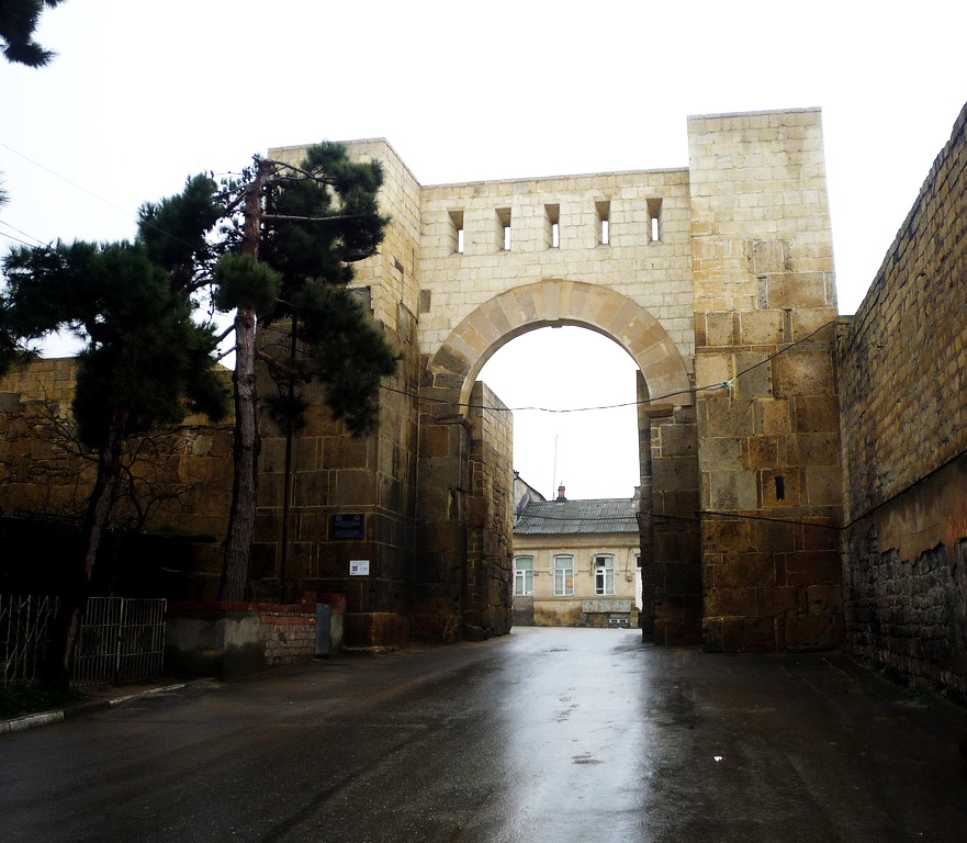 Ворота Дубары-Капы в Дербенте